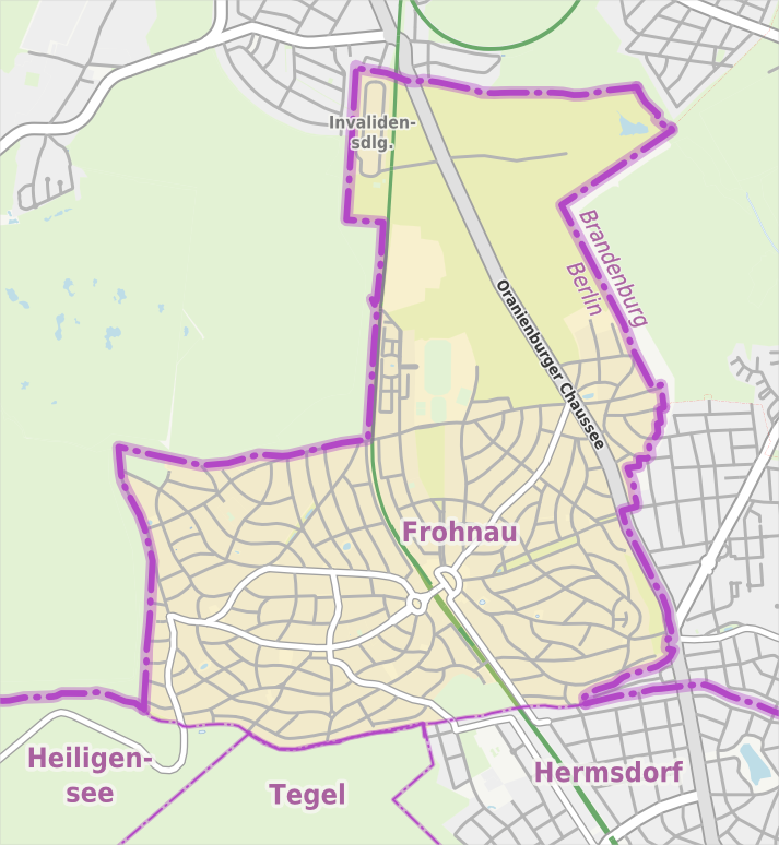 Übersichtskarte der Straßen und Ortslagen in Berlin-Frohnau